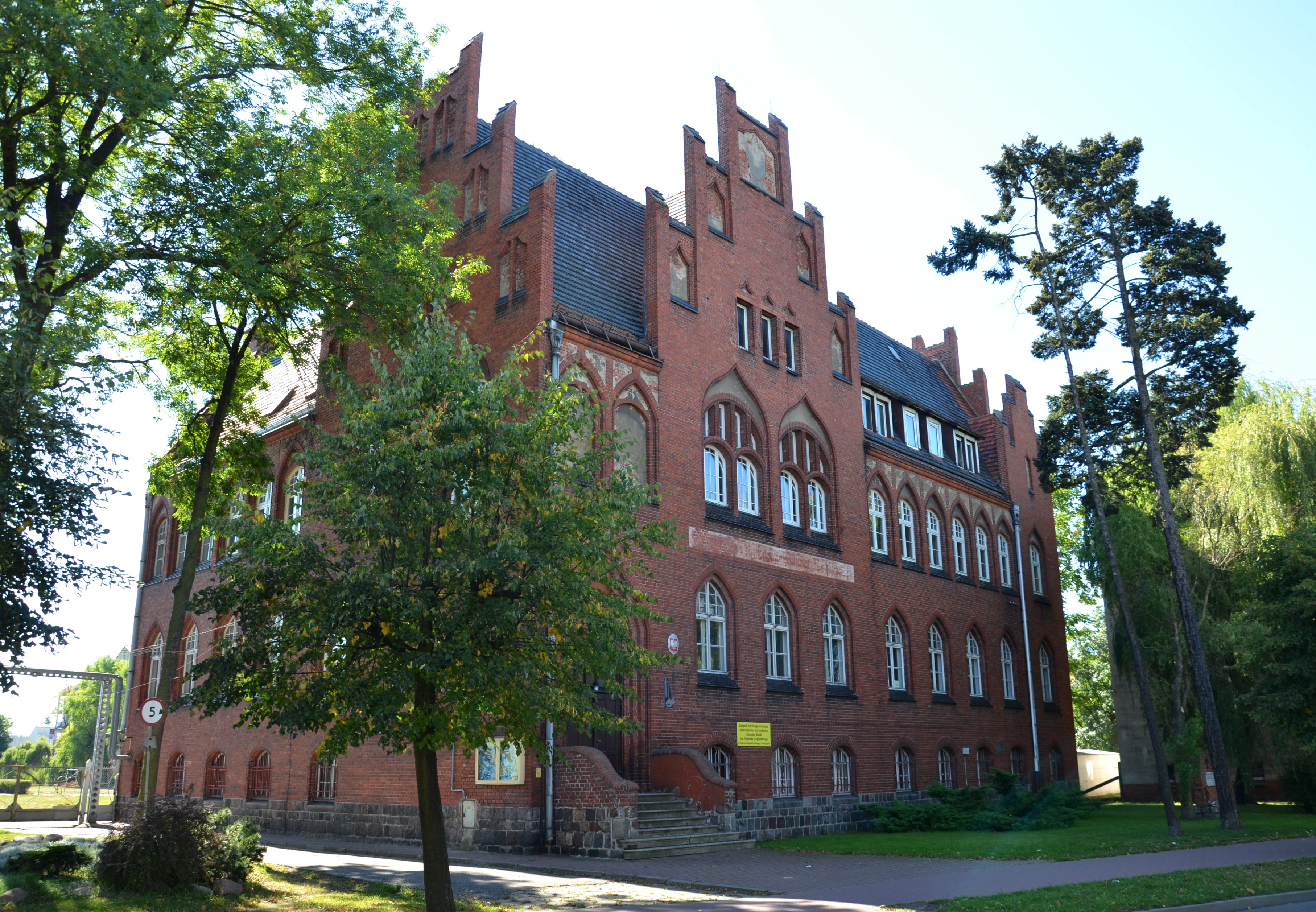 Rogoźno, sąd, ob. zespół szkół rolniczych, 1905